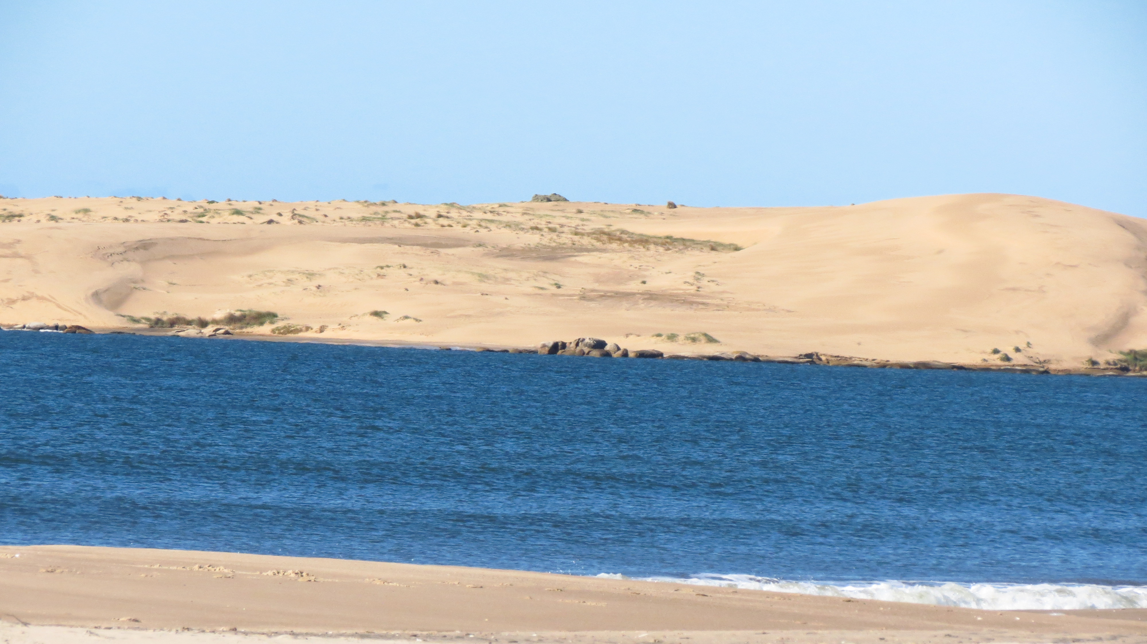 Para practicar sandboard con dunas que alcanzan hasta 30 metros de altura.